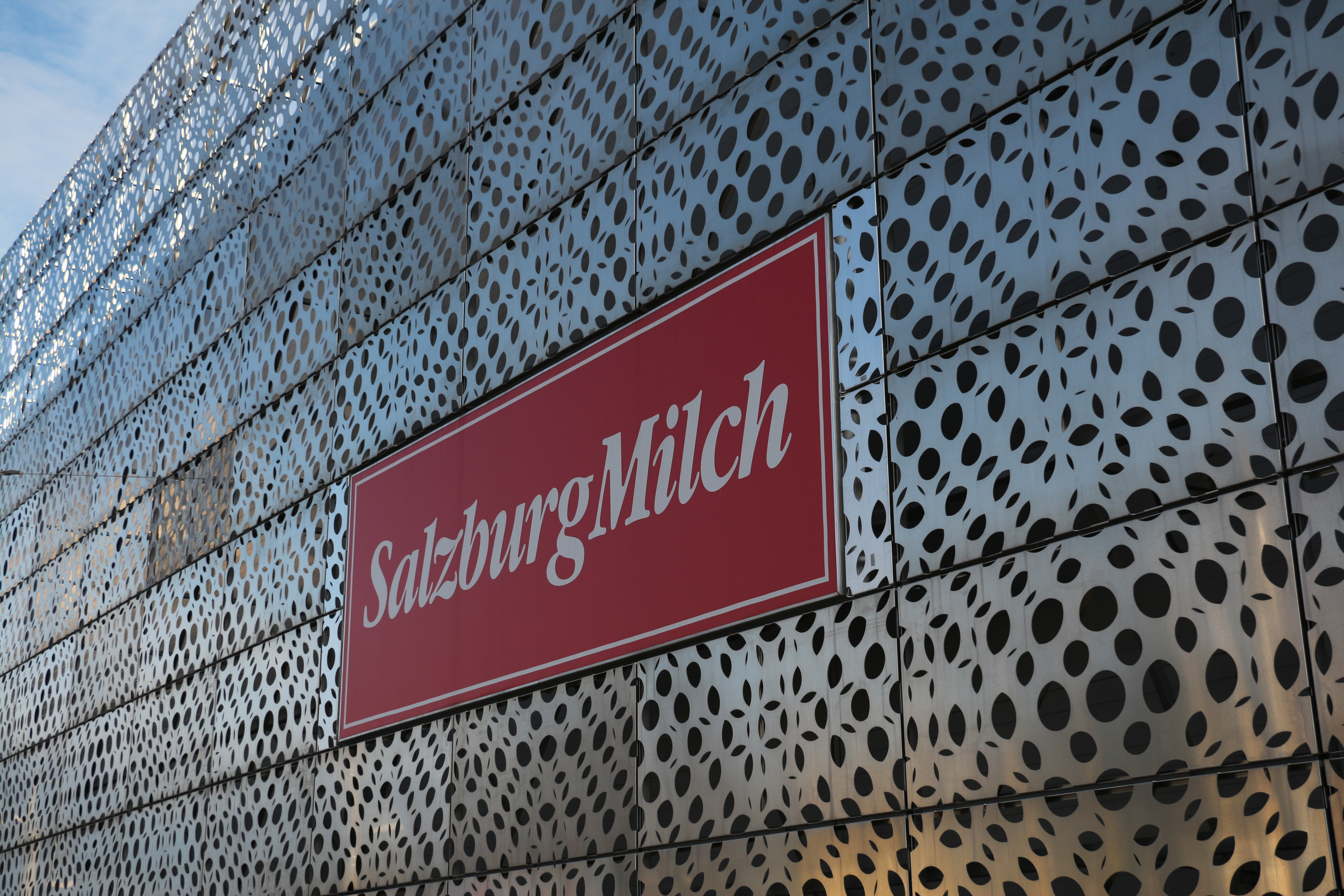 Das seit 2013 aktuelle Logo der "SalzburgMilch" auf der Fassade des Hauptgebäudes des Unternehmens in Salzburg-Itzling.